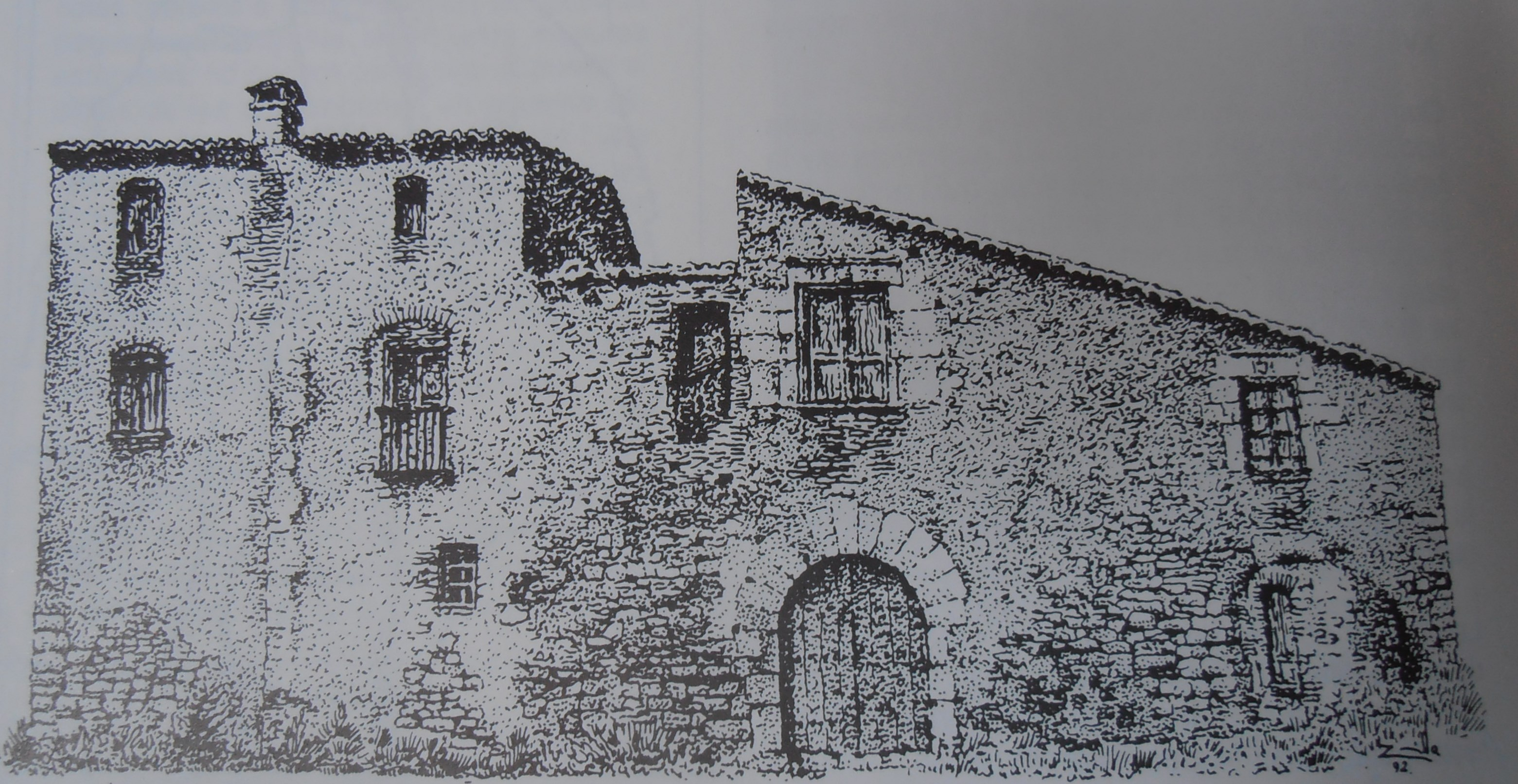 Can Riera (dibuix del mestre Manuel Zorrilla i Giné) de com era la masia a principis del segle XX